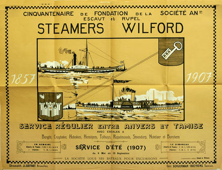 Affiche van de stoombootrederij "Schelde & Rupel"